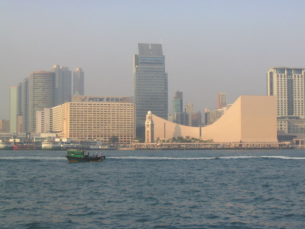 尖沙咀 Tsim Sha Tsui